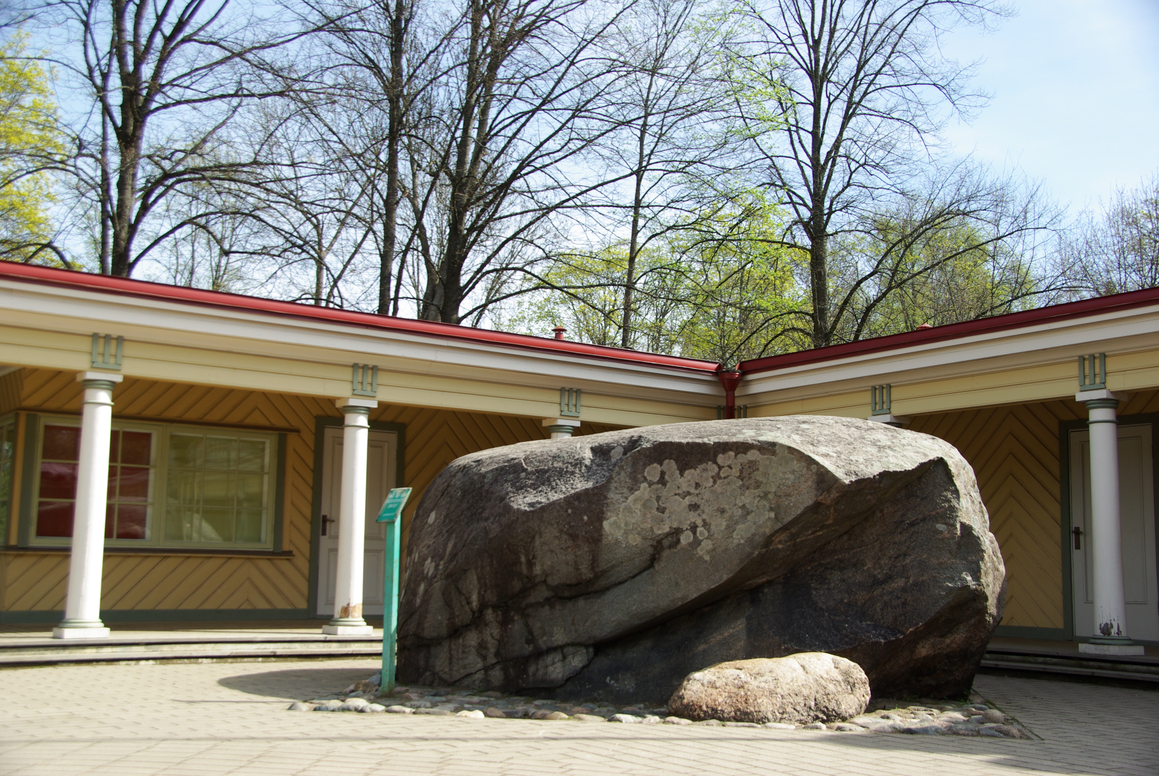 Noortepargi kivi; Lastepargi kivi